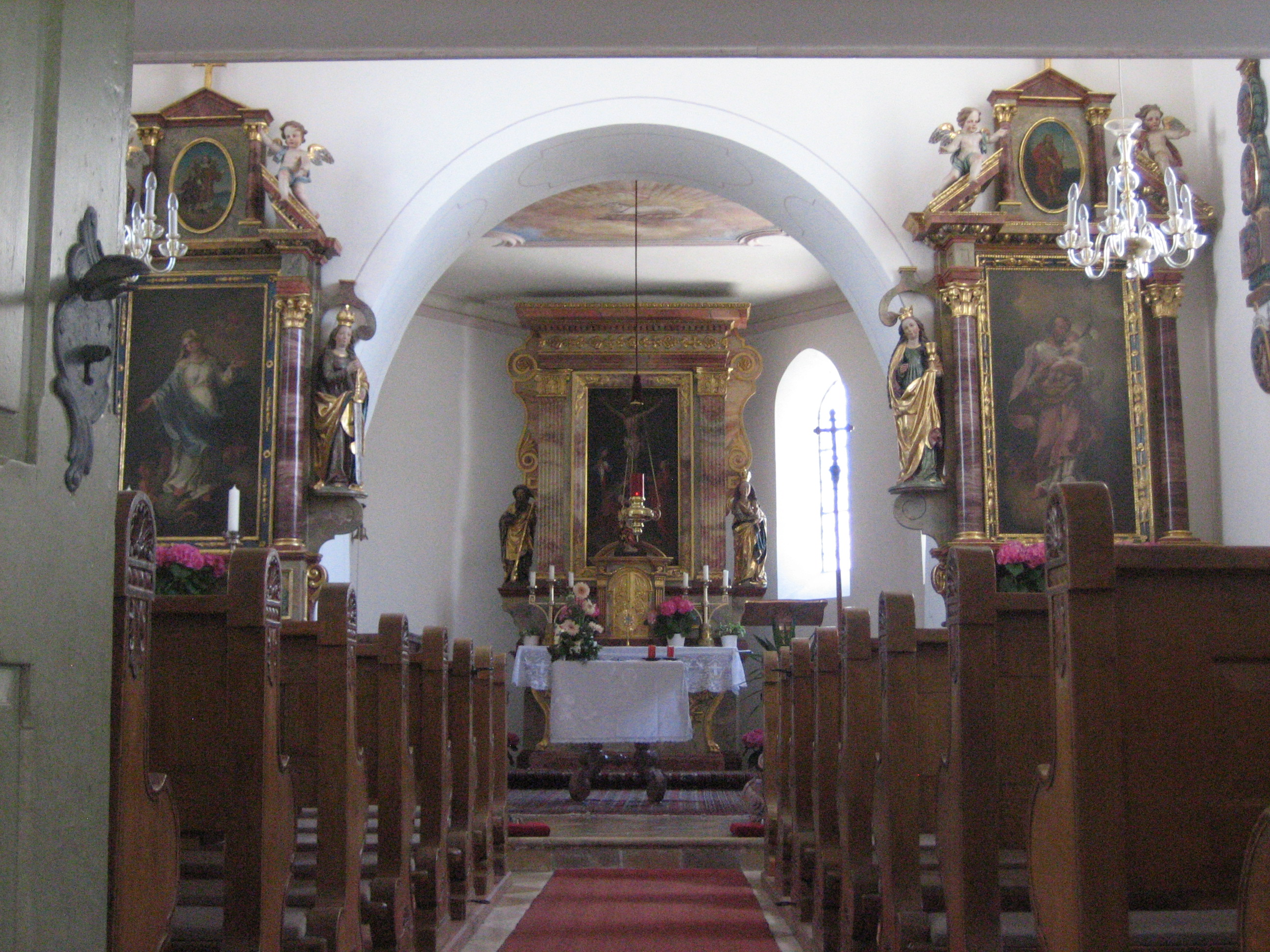 Kapelle Dietratried